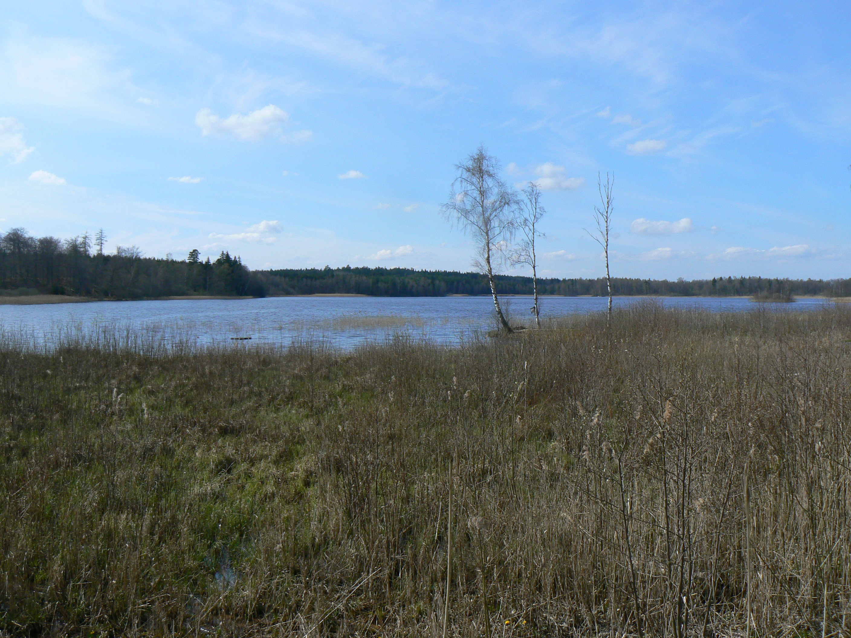 Lillsjön, lake in Linköping Municipality, Sweden.